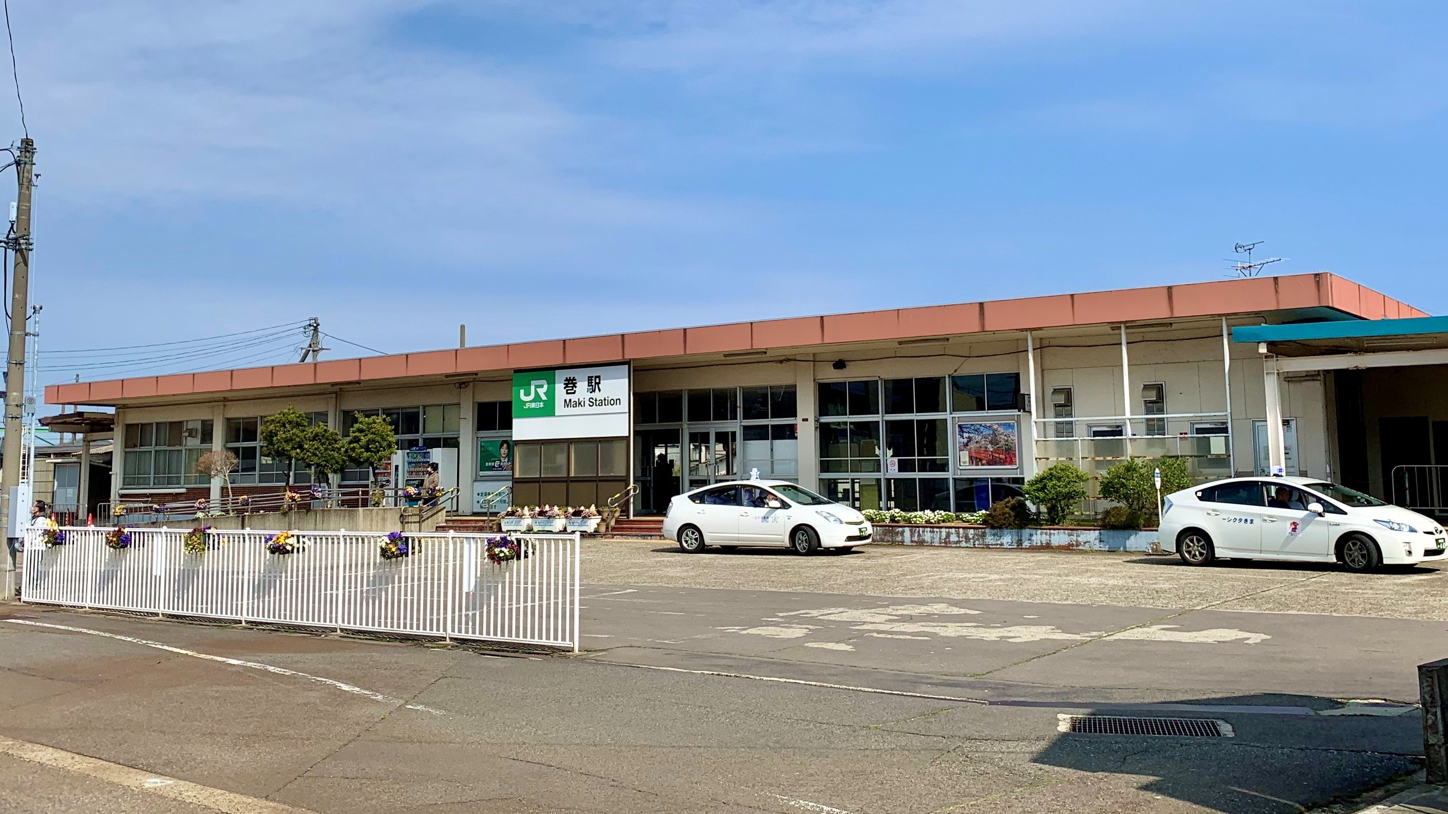 巻駅の駅舎（2020年3月）